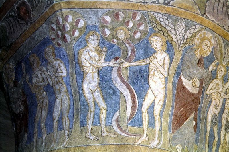 Nylars Kirke på Bornholm